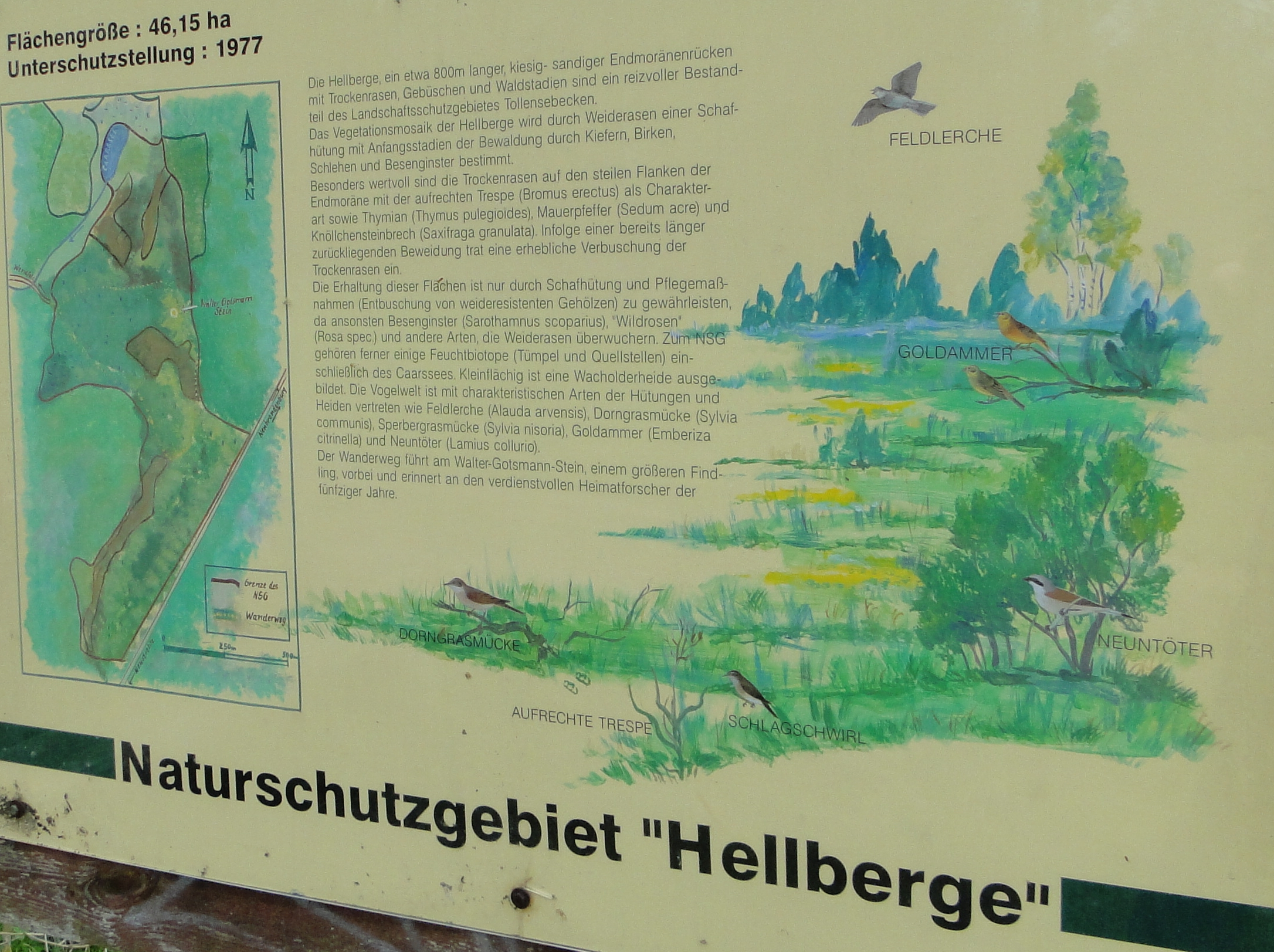 Hellberge bei Neubrandenburg, Mecklenburg-Vorpommern. Naturschutzgebiet.